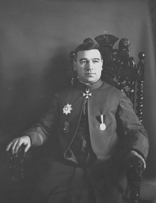 Audytor nuncjatury apostolskiej w Polsce ks. prałat Carlo Chiarlo.